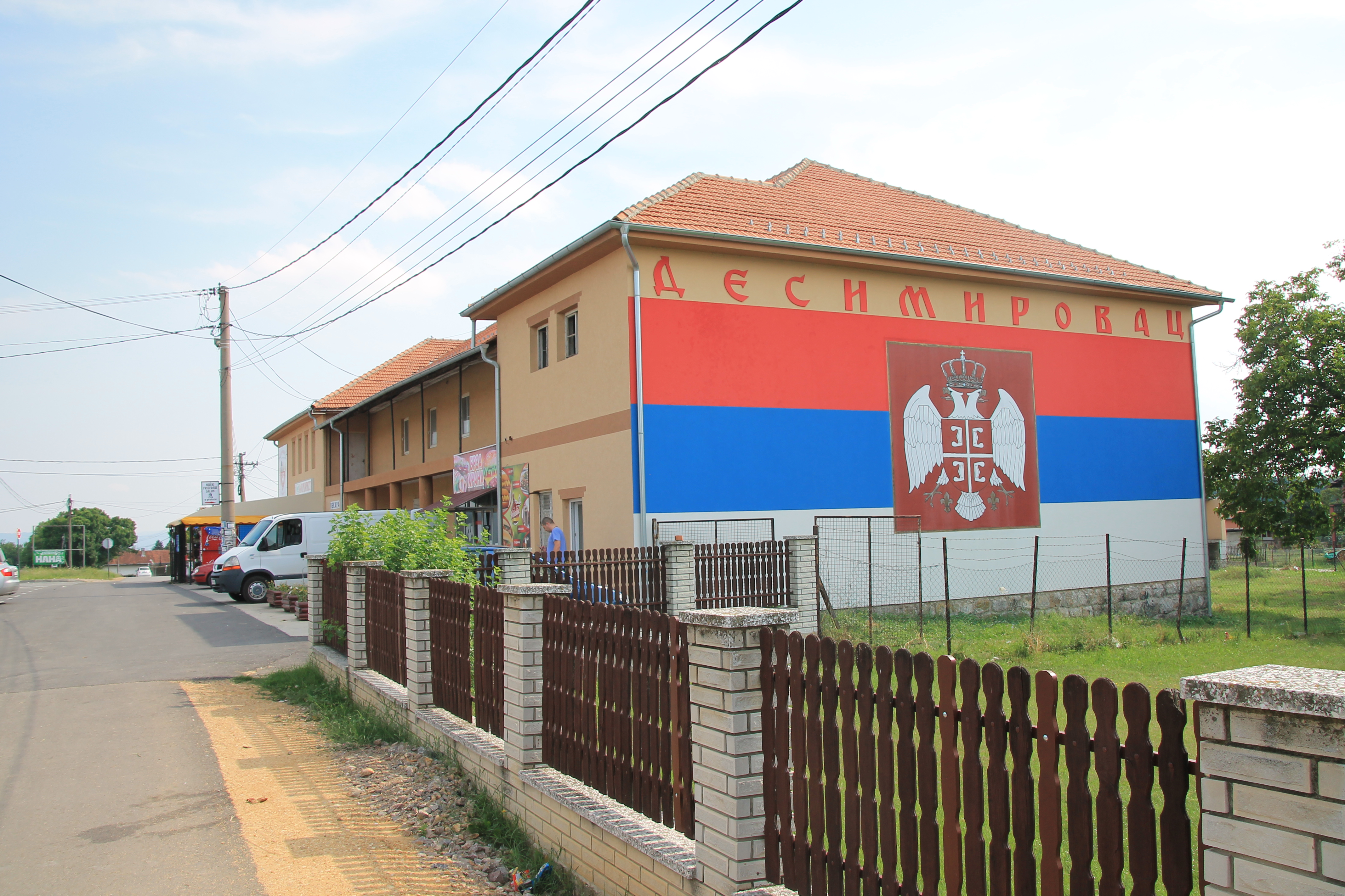 Desimirovac